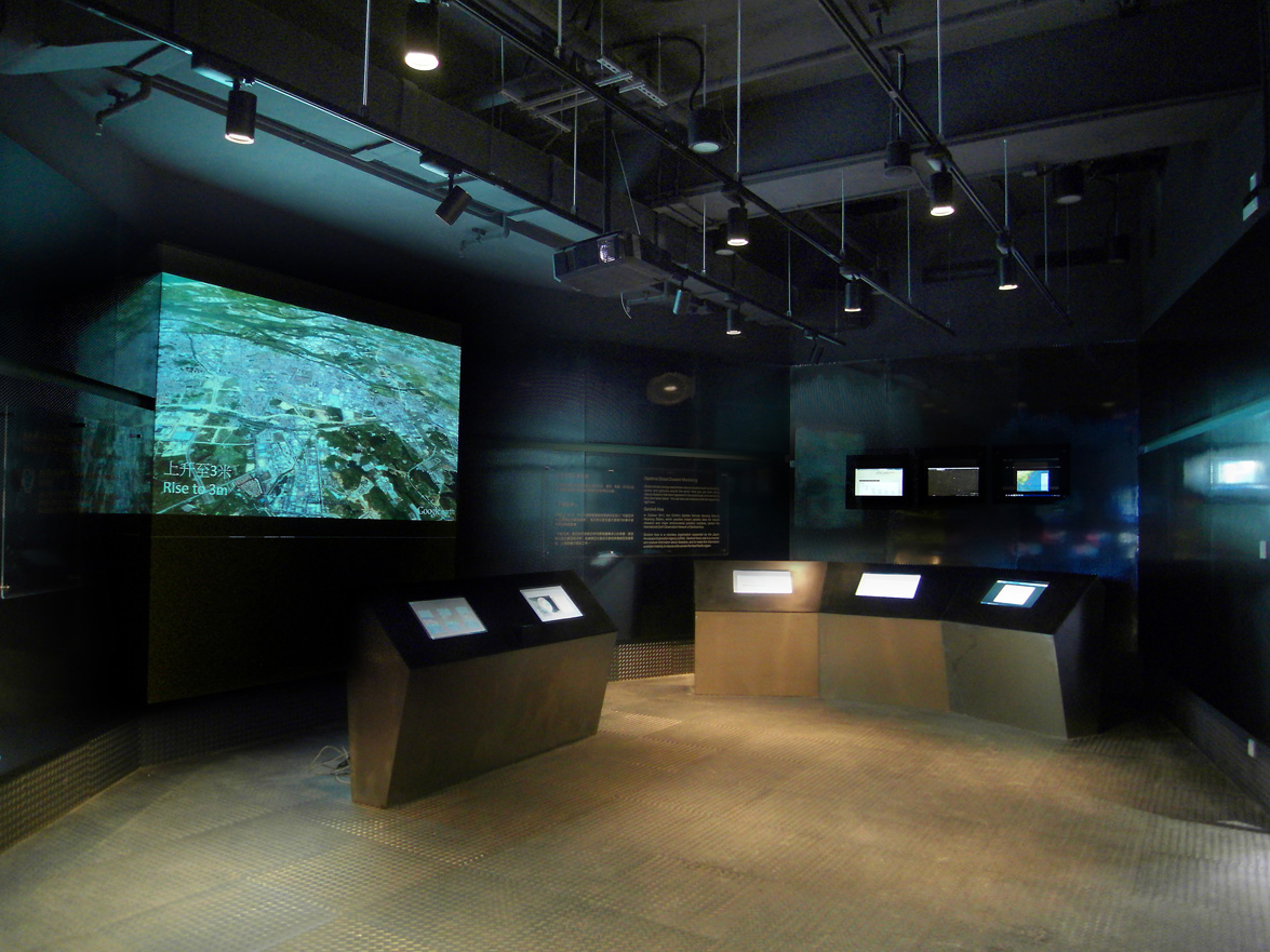 中文（香港）: 賽馬會氣候變化博物館